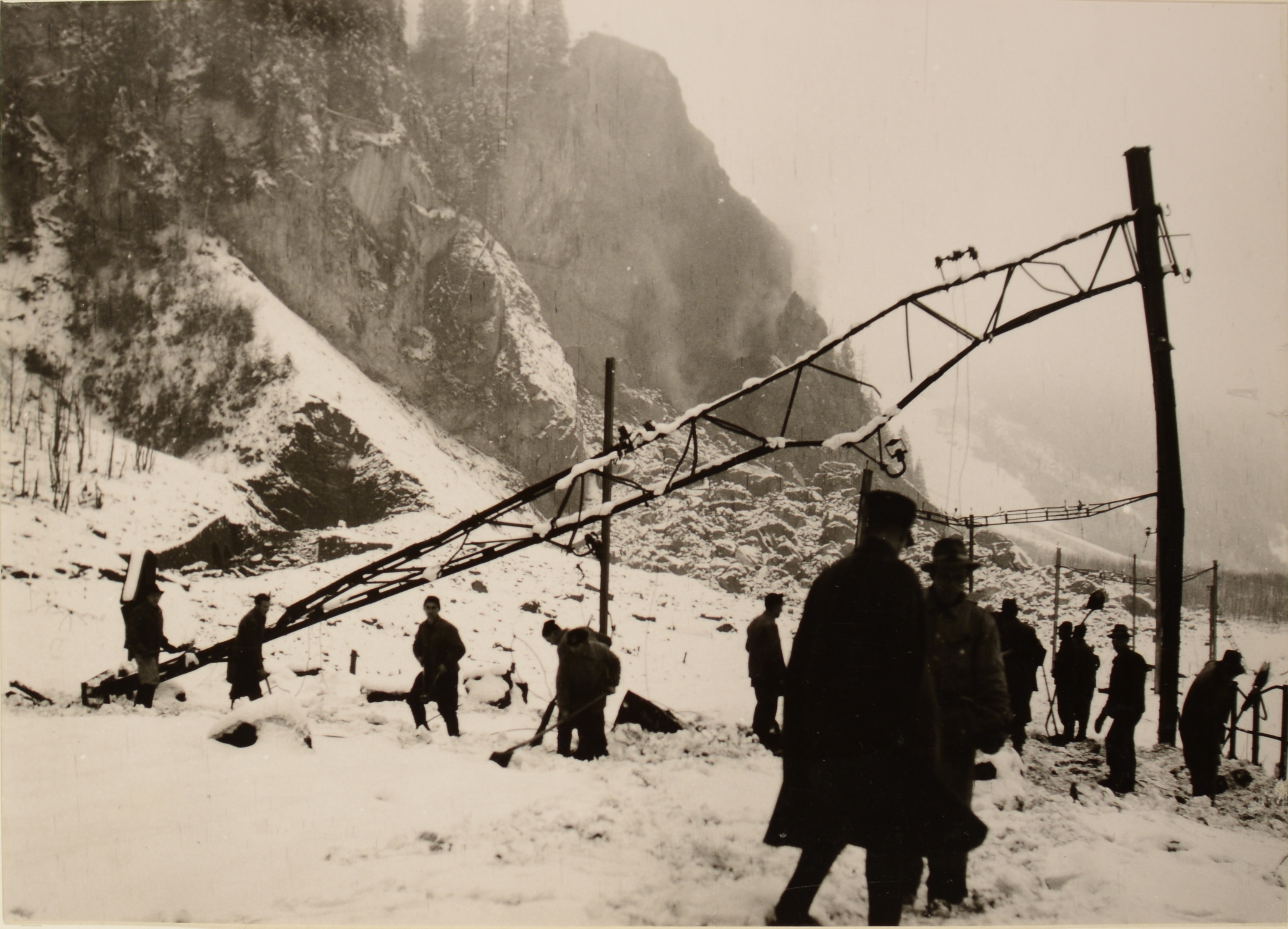 Nahaufnahme eines zerstörten Fahrleitungsmasten - und Trägers.